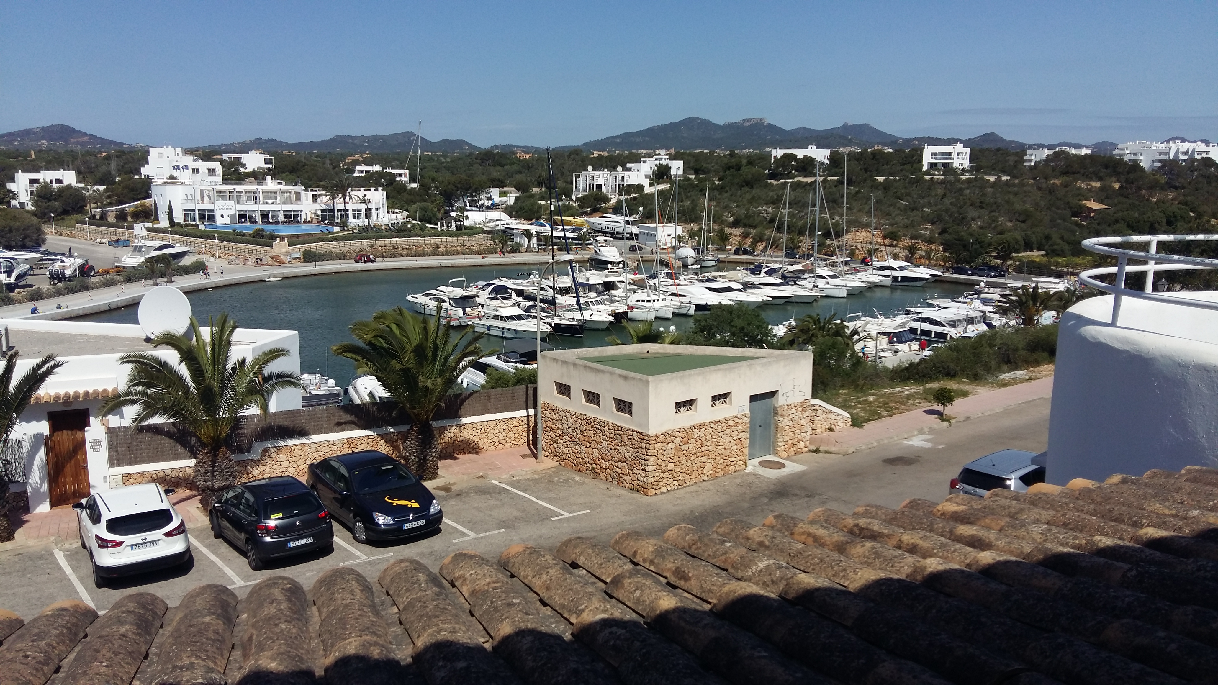 Il Port Petit di cala d'or